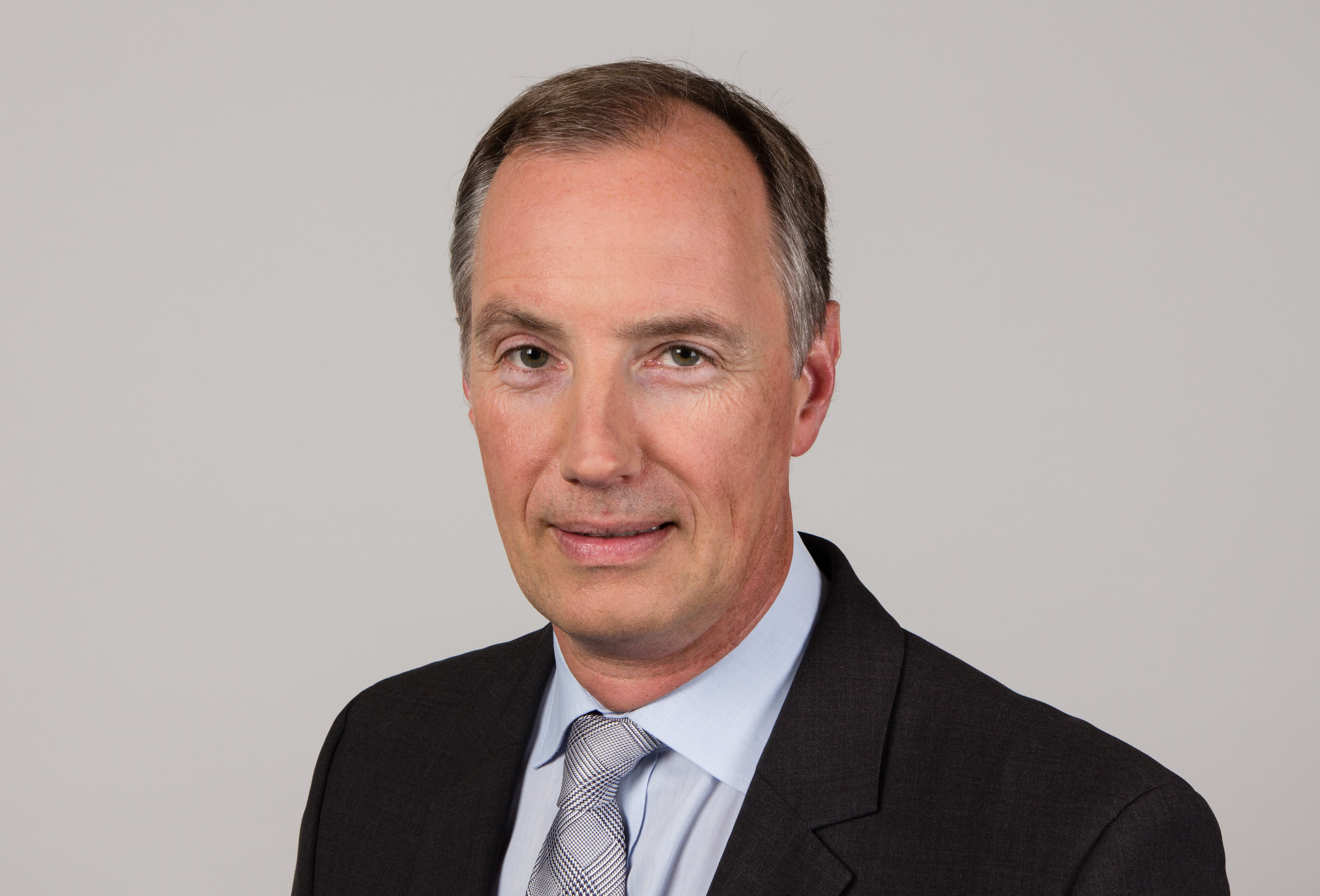 Matthias Heider (* 18. Mai 1966 in Lüdenscheid) ist ein deutscher Politiker (CDU). Wikipedia-Bundestagsprojekt 2014 8–12 September 2014 in BerlinThis file was taken during the project “Wiki loves parliaments/Bundestag 2014” (German). Organisation: Martin Rulsch, Olaf KosinskyDesign: Martin KraftPhotography: Foto-AG Gymnasium Melle (Jan-Kristof Blömke, Lukas Eismann, Moritz Kosinsky, Laura Lessing, Karsten Mosebach, Mascha Mosebach, Teresa Schreer, Noah Sewöster, Niklas Tschöpe), Olaf Kosinsky, Martin Kraft, Harald Krichel, Steffen Prößdorf, Ralf Roletschek, Martin Rulsch, Gerd Seidel, Sven TeschkeVideo: Marc Rudnick, Manuel SchneiderEditors: Marcus Cyron, Günter Fremuth, Martin Kraft, Robin Krahl, Harald Krichel, Martin Rulsch, WikiAnikaReception: DasMonstaaa, Leonie Rabea Große, Lutheraner, Nina Möllering, Martin Rulsch, WikiAnika, Foto-AG Gymnasium MelleCosmetics: Regina Bosak, Bettina Dieguez, Sandra Kobbe, Andrea Strehlke; Irada Abdullayeva, Vivien Abelmann, Olena Engelbrecht, Sarah Fabini, Nina Magnus, Jacqueline Schmidt, Leonie Taboada, Julia Willer Usage information If you need more information how to use this file, please send an email to . Personality rights warningAlthough this work is freely licensed or in the public domain, the person(s) shown may have rights that legally restrict certain re-uses unless those depicted consent to such uses. In these cases, a model release or other evidence of consent could protect you from infringement claims.